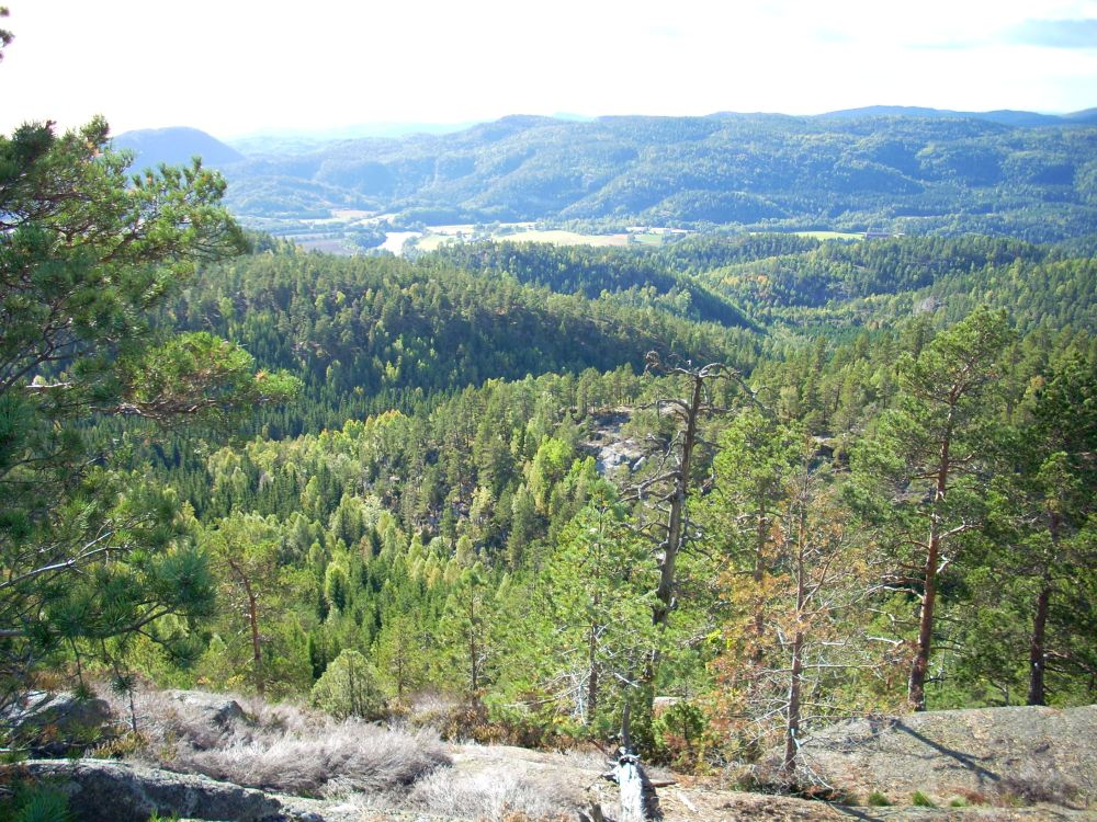 Fra Korpens vestside er det flott utsikt mot Lågendalen.